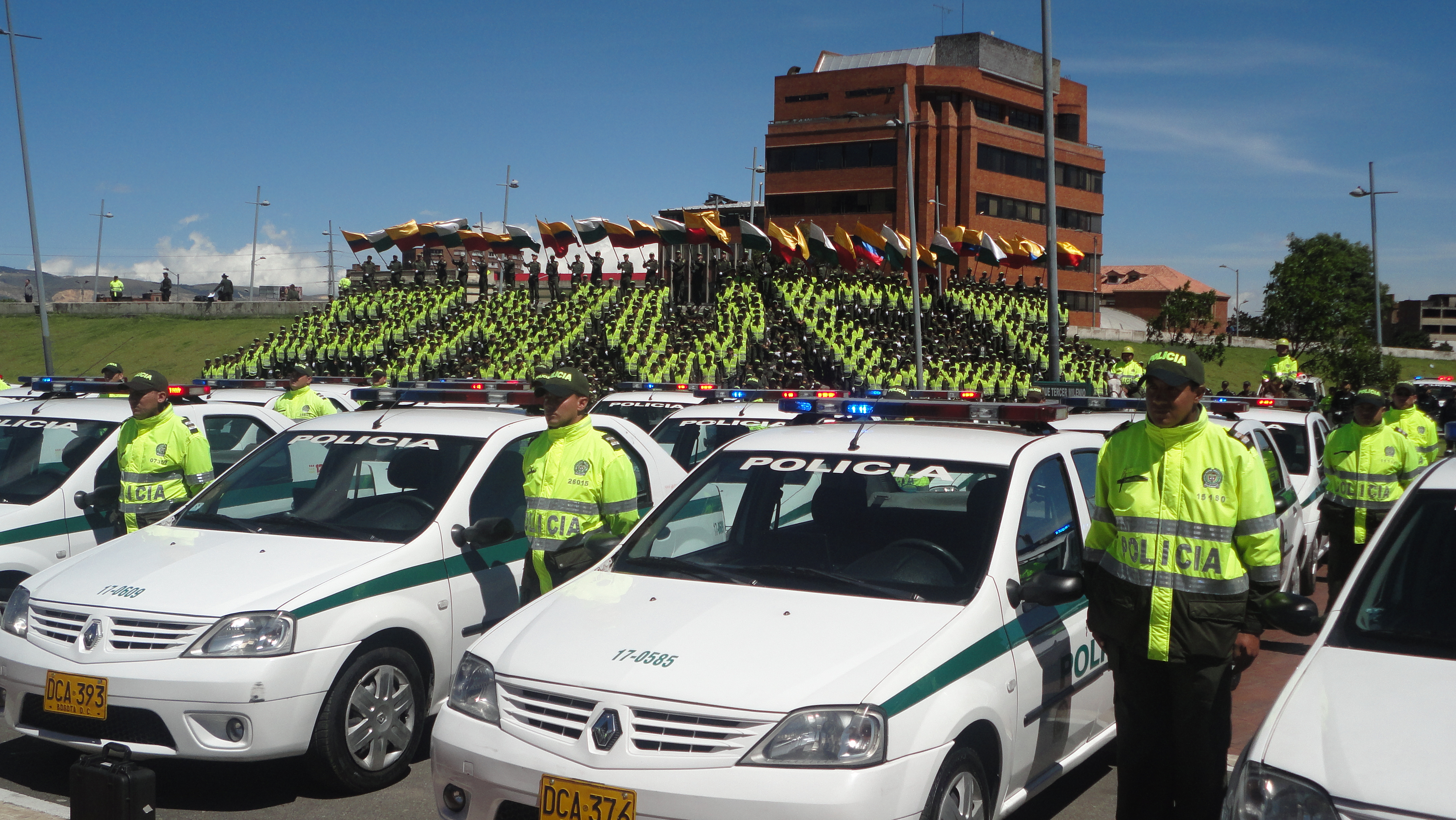 Plan Plataforma ciudad Bogotá